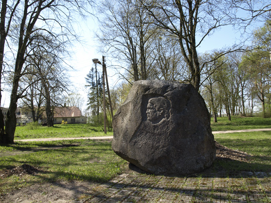 Sujetų_gyvenvietė_Panevėžio_rajonas